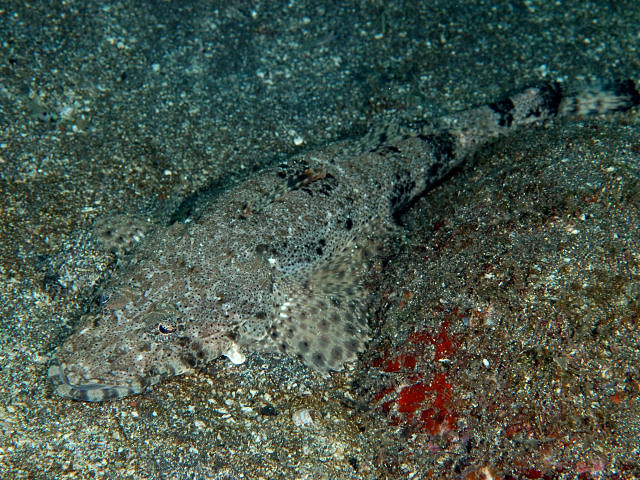 ワニゴチ Inegocia ochiaii